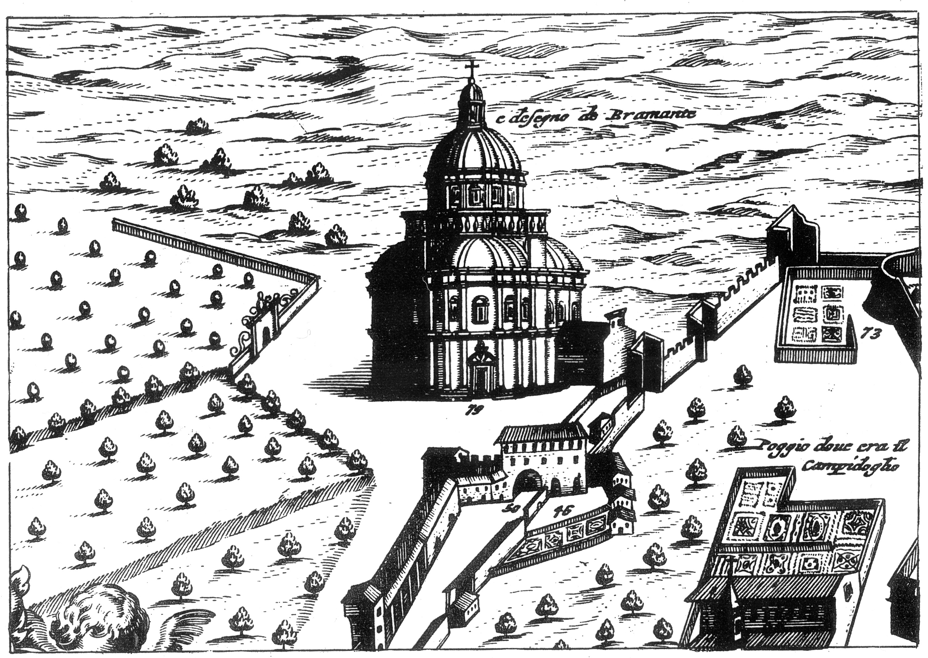 Jean Bleau, Todi, Santa Maria della Consolazione, opera del 1663.